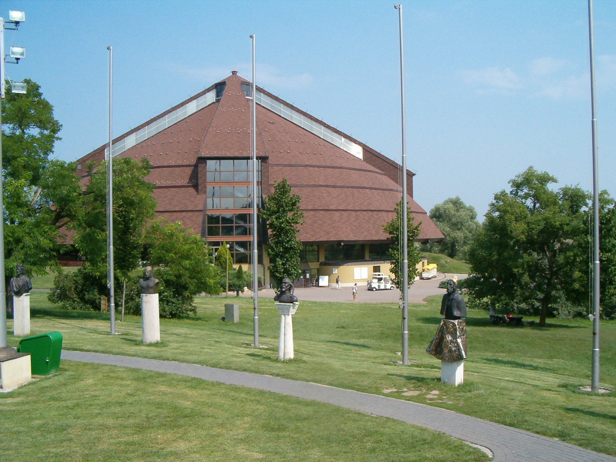 királyok, fejedelmek Nemzeti Történeti Emlékpark / National Historical Memorial Park in Ópusztaszer, Hungary self shot photo (2005), Váradi Zsolt